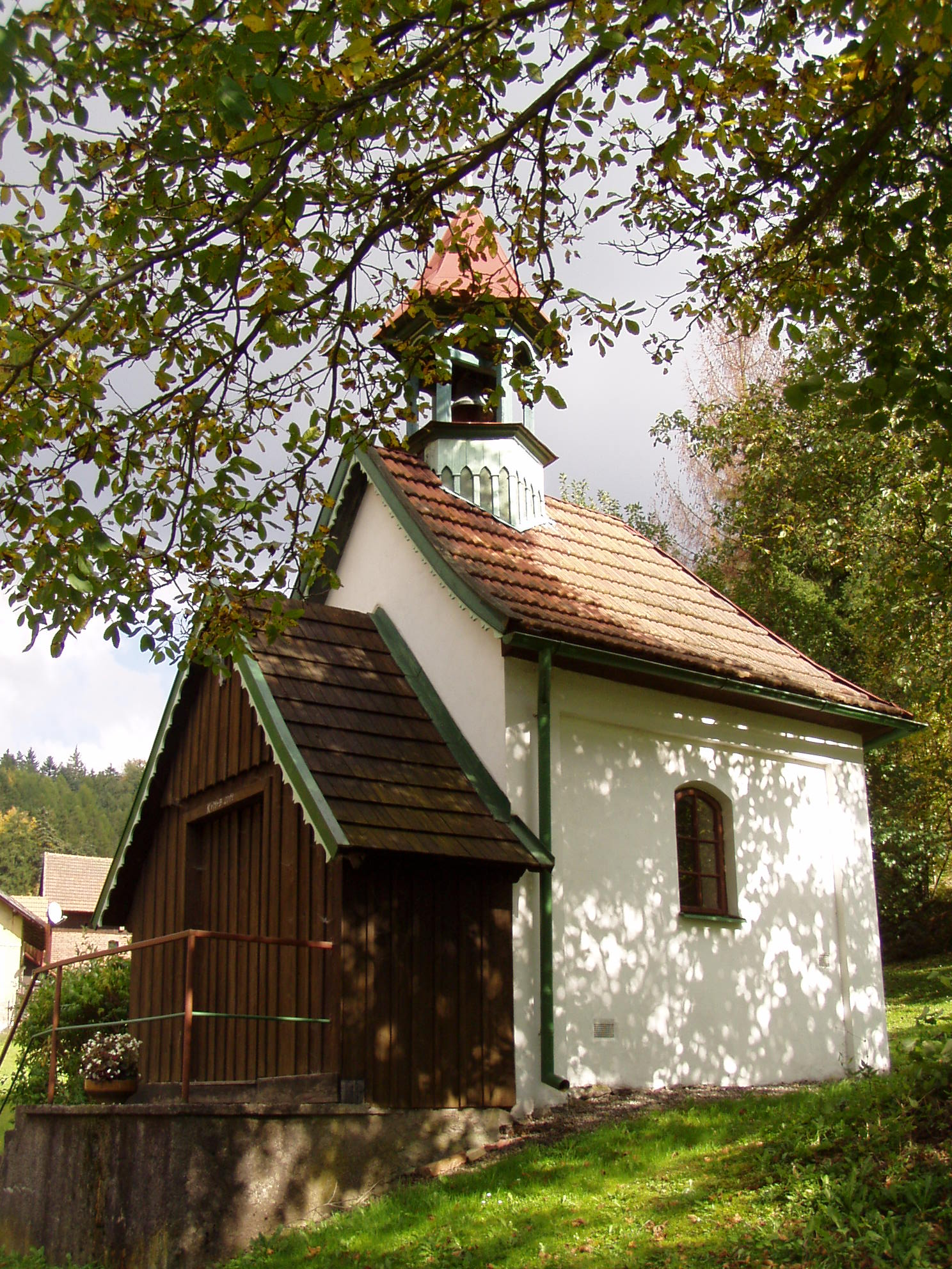 Kaple Panny Marie Královny